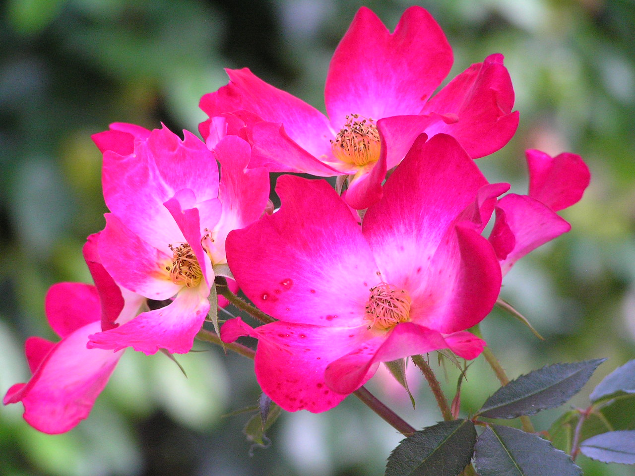 コクテール（カクテル）：Cocktail 北播磨余暇村